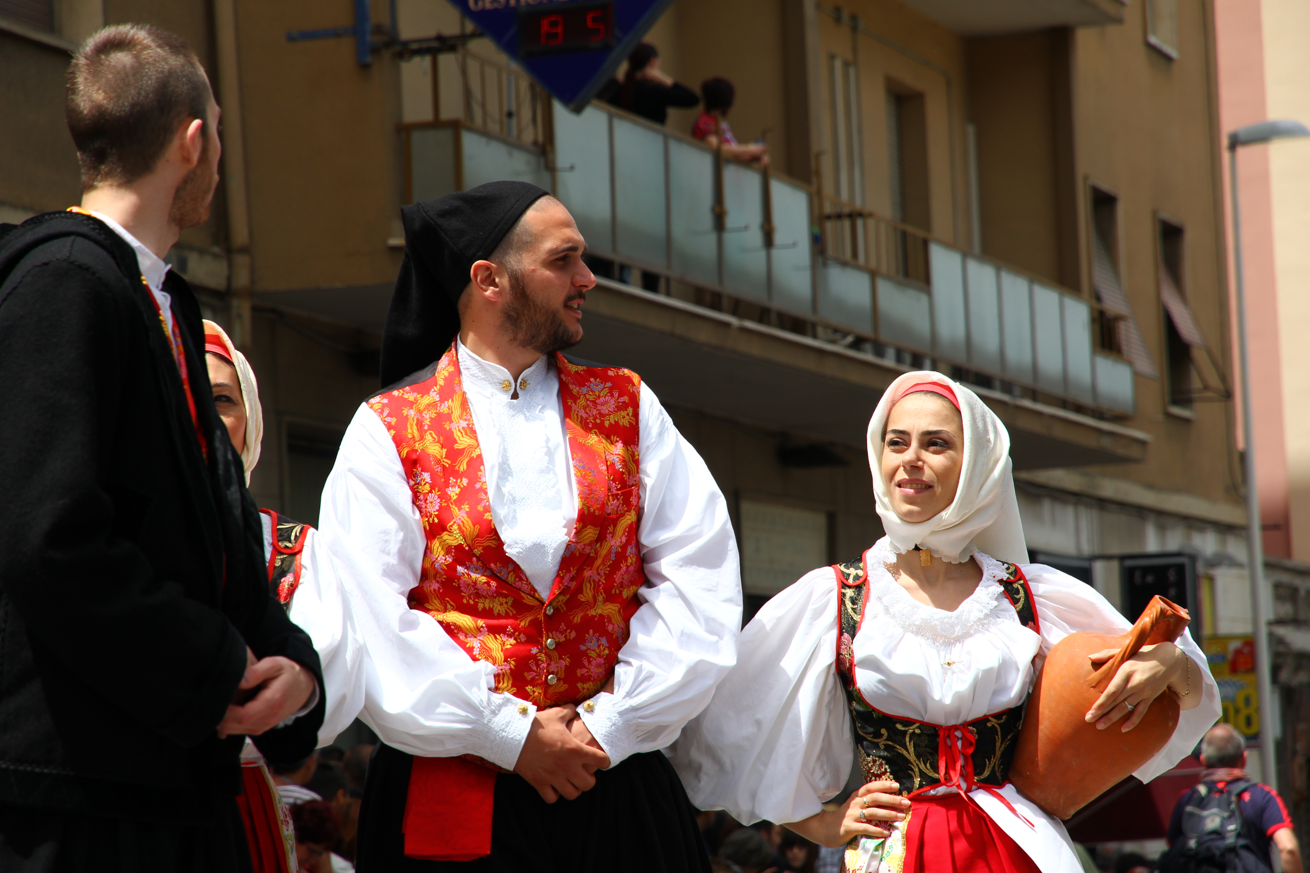 Cavalcata Sarda 2013 (Sassari)